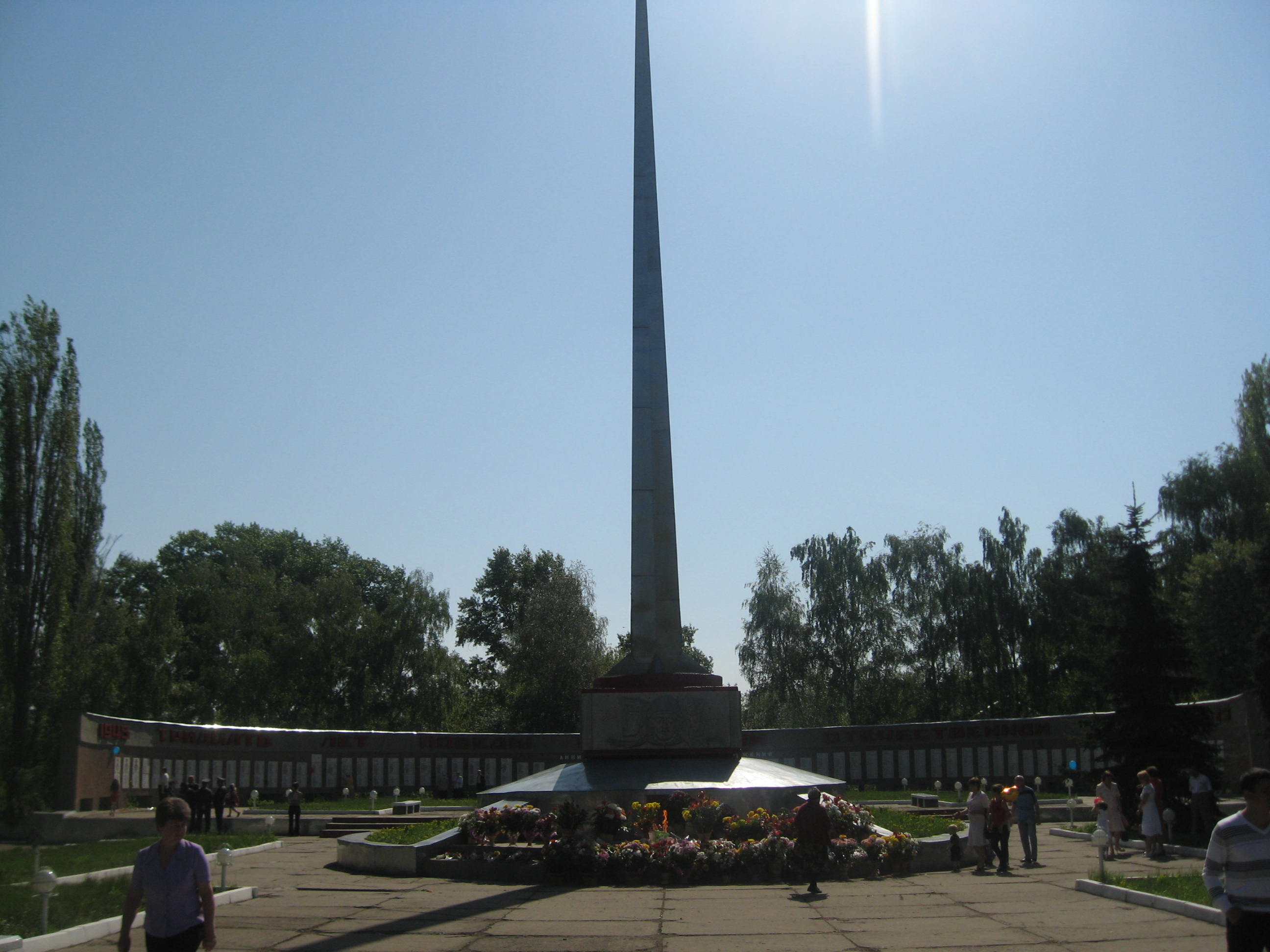 Виден мемориал.